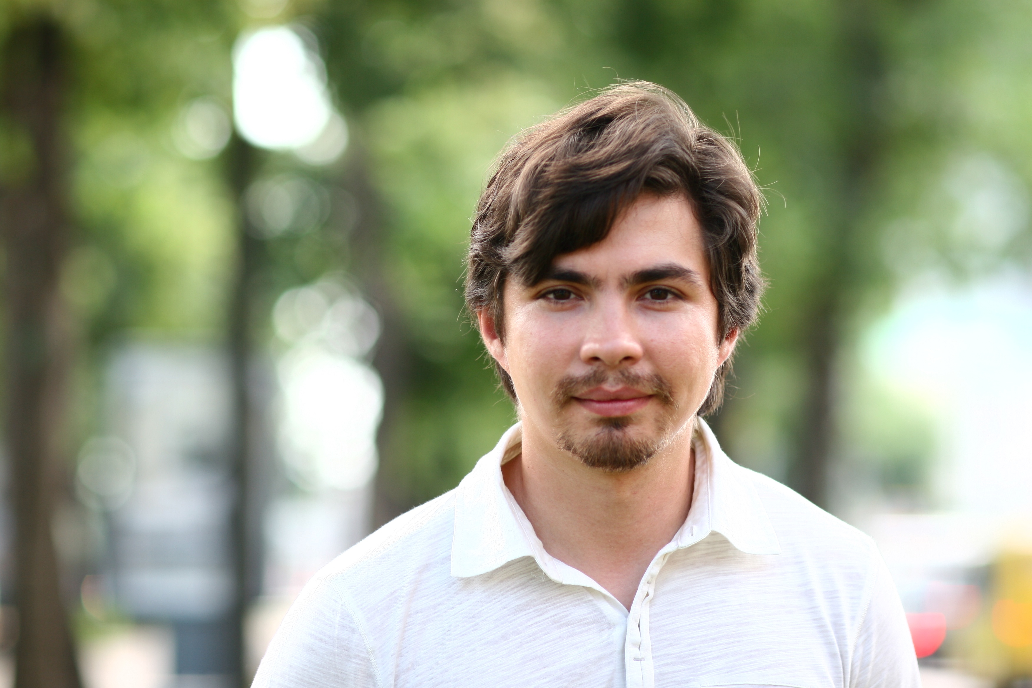 Российский технологический предприниматель Руслан Фазлыев